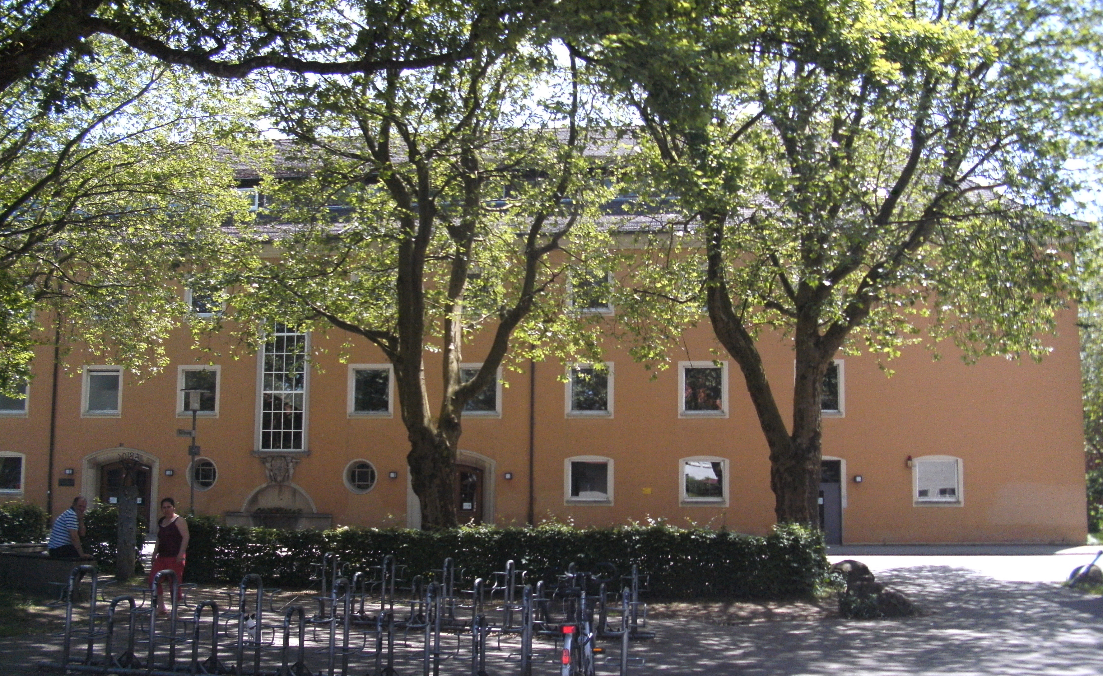 A-Bau, auch Altbau genannt, des Rupert-Neß-Gymnasiums in Wangen im Allgäu